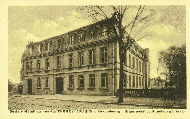 Luxembourg, bâtiment des "Terres Rouges", siège social